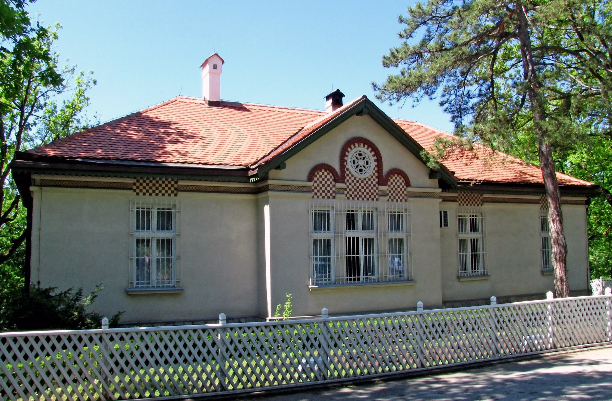 Петрова кућа